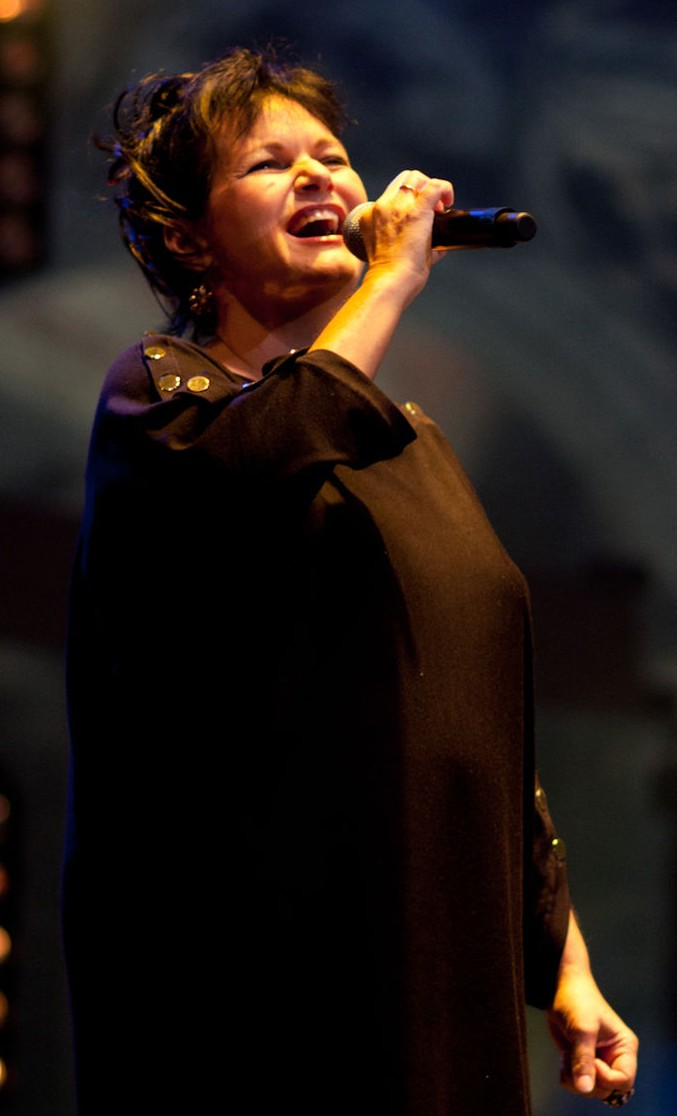 Maurane à la Fête de la Fédération Wallonie-Bruxelles.